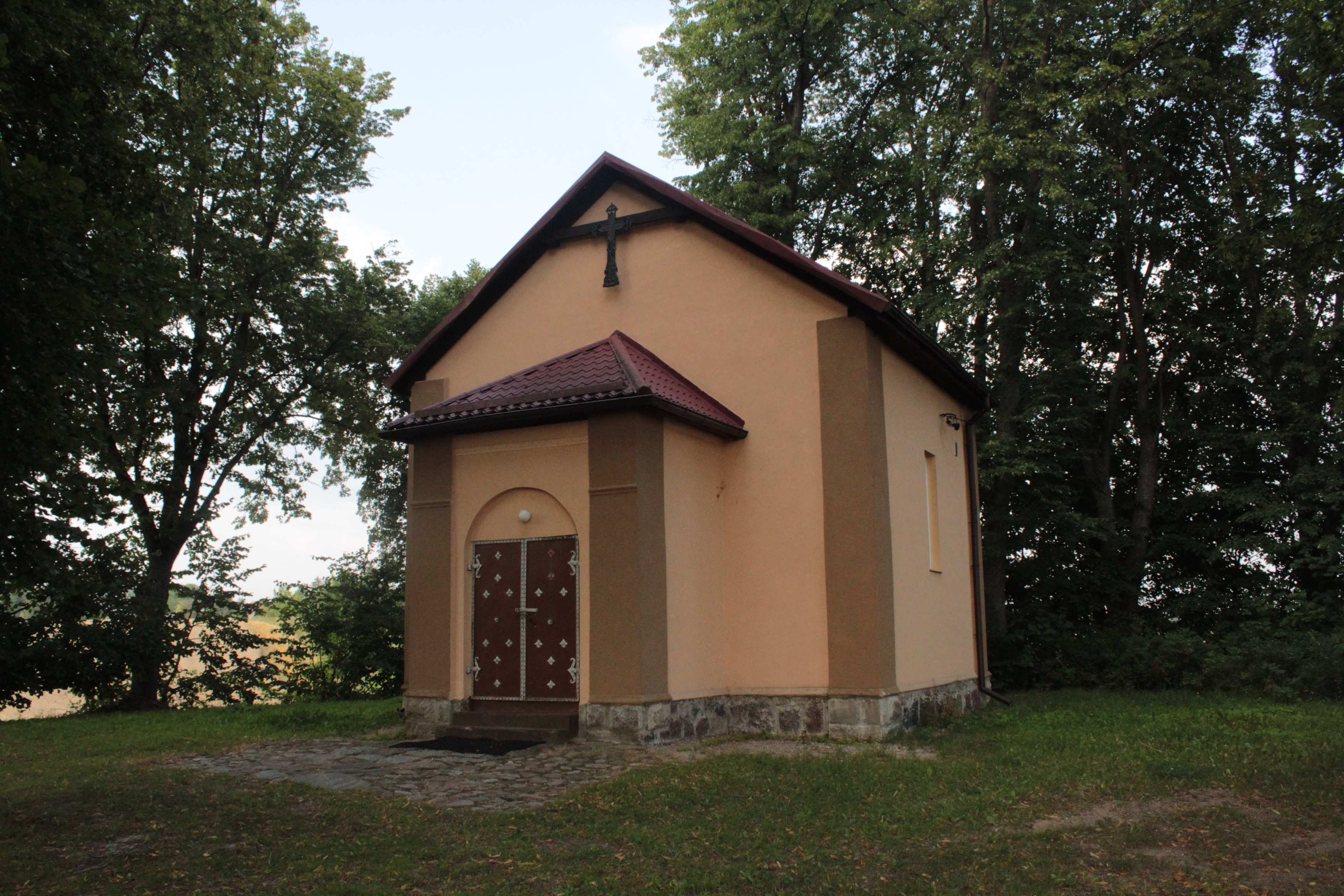 Bryła kaplicy w Możdżanach